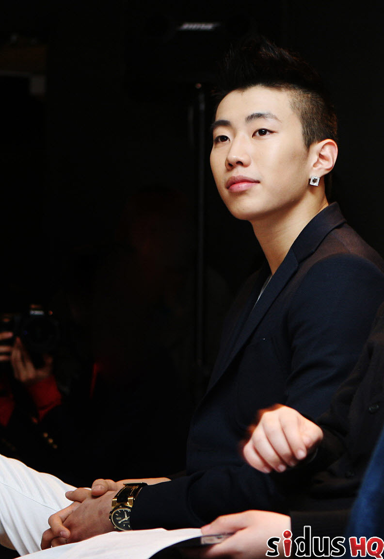 현대백화점 드림아카데미 with Ne-yo